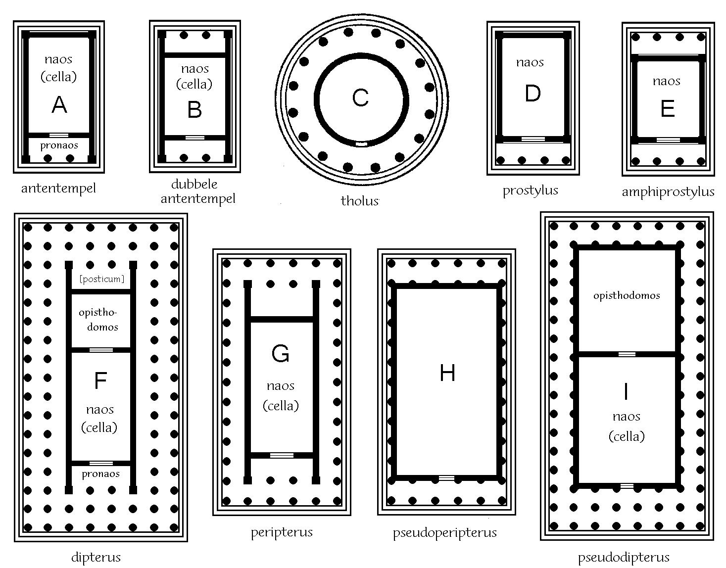 eigen ontwerp didactisch materiaal